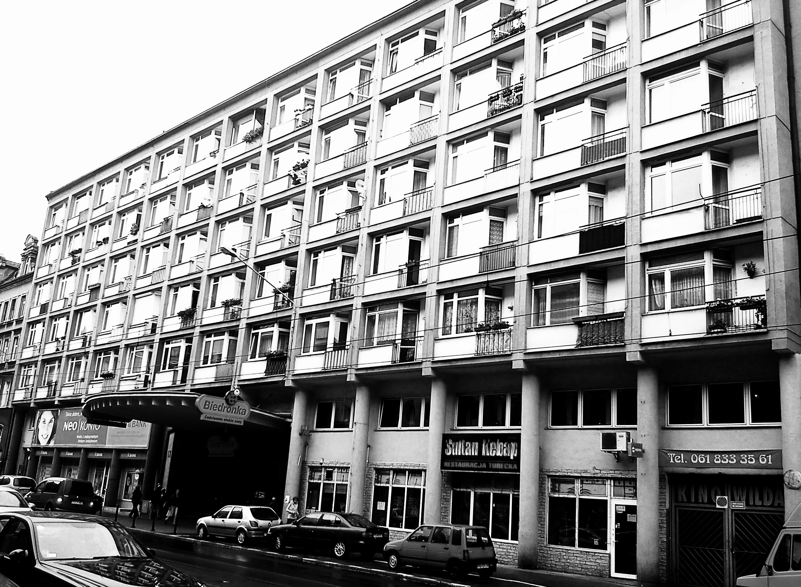 old cinema WILDA in Poznań (Biedronka market)